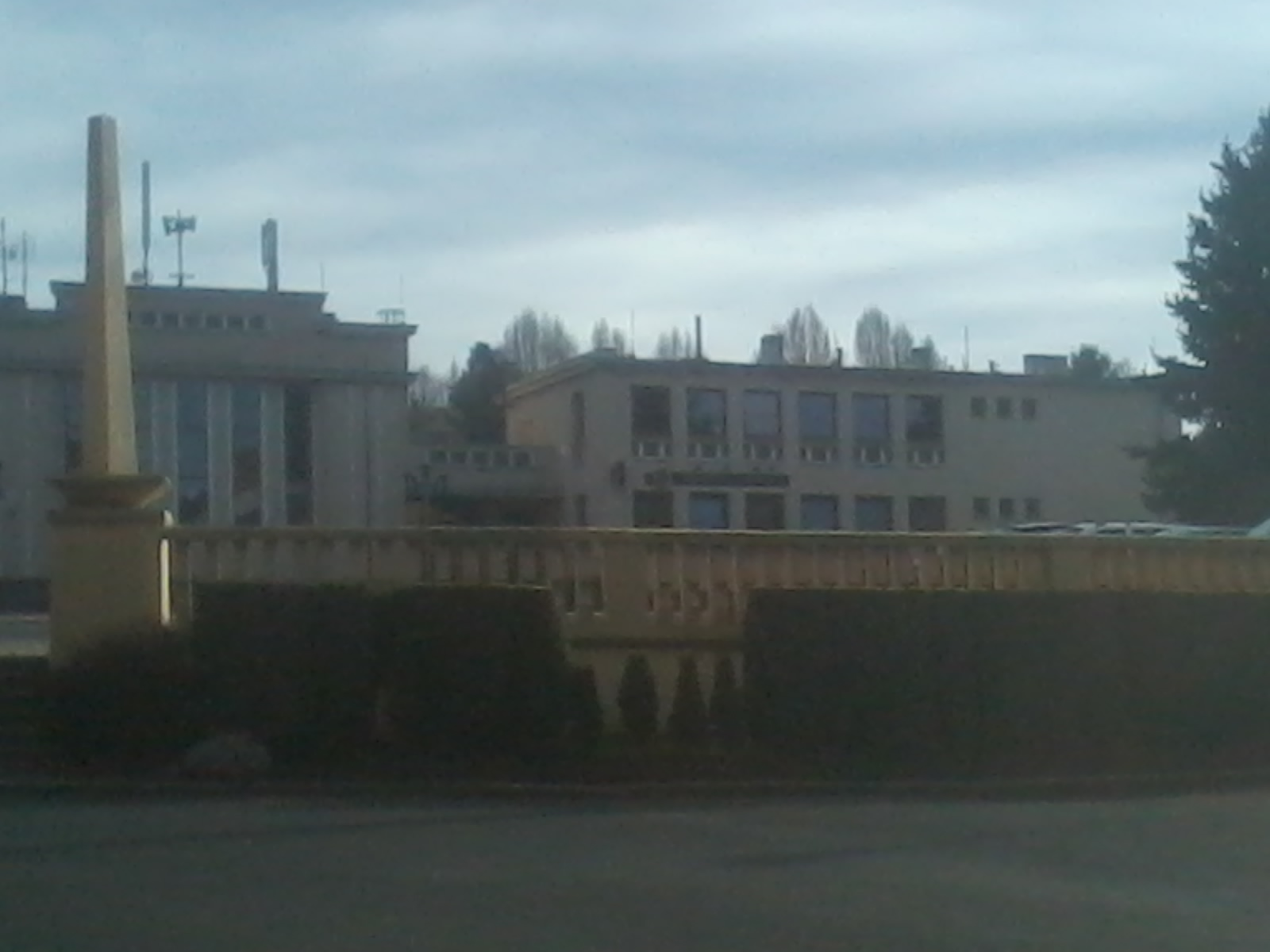 Kulturní dům a pivnice